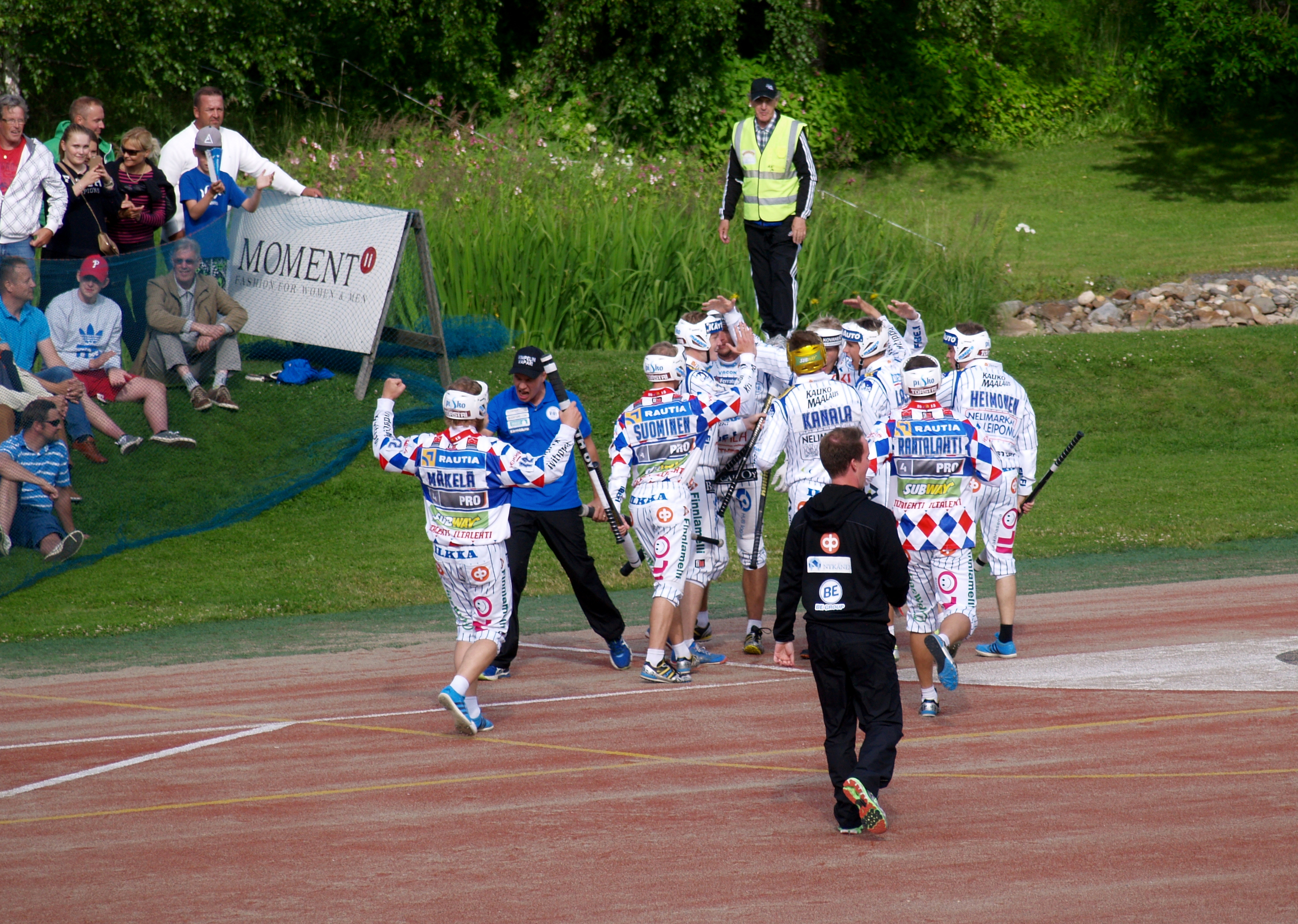 Vimpelin Veto - Sotkamon Jymy pesäpallo-ottelu 19.7.2015.